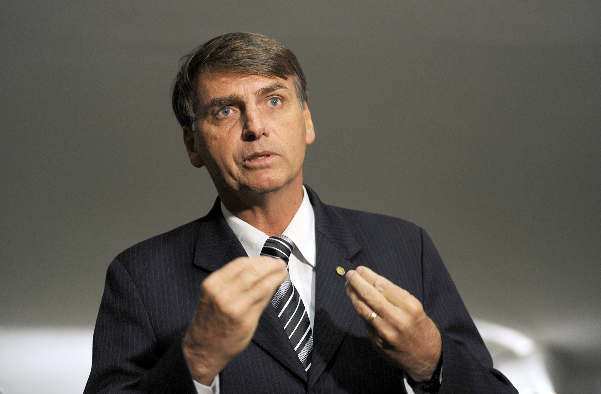 Salão Verde Entrevista Dep. Jair Bolsonaro fala sobre comissão da verdade Foto: janine Moraes 05.05.2010